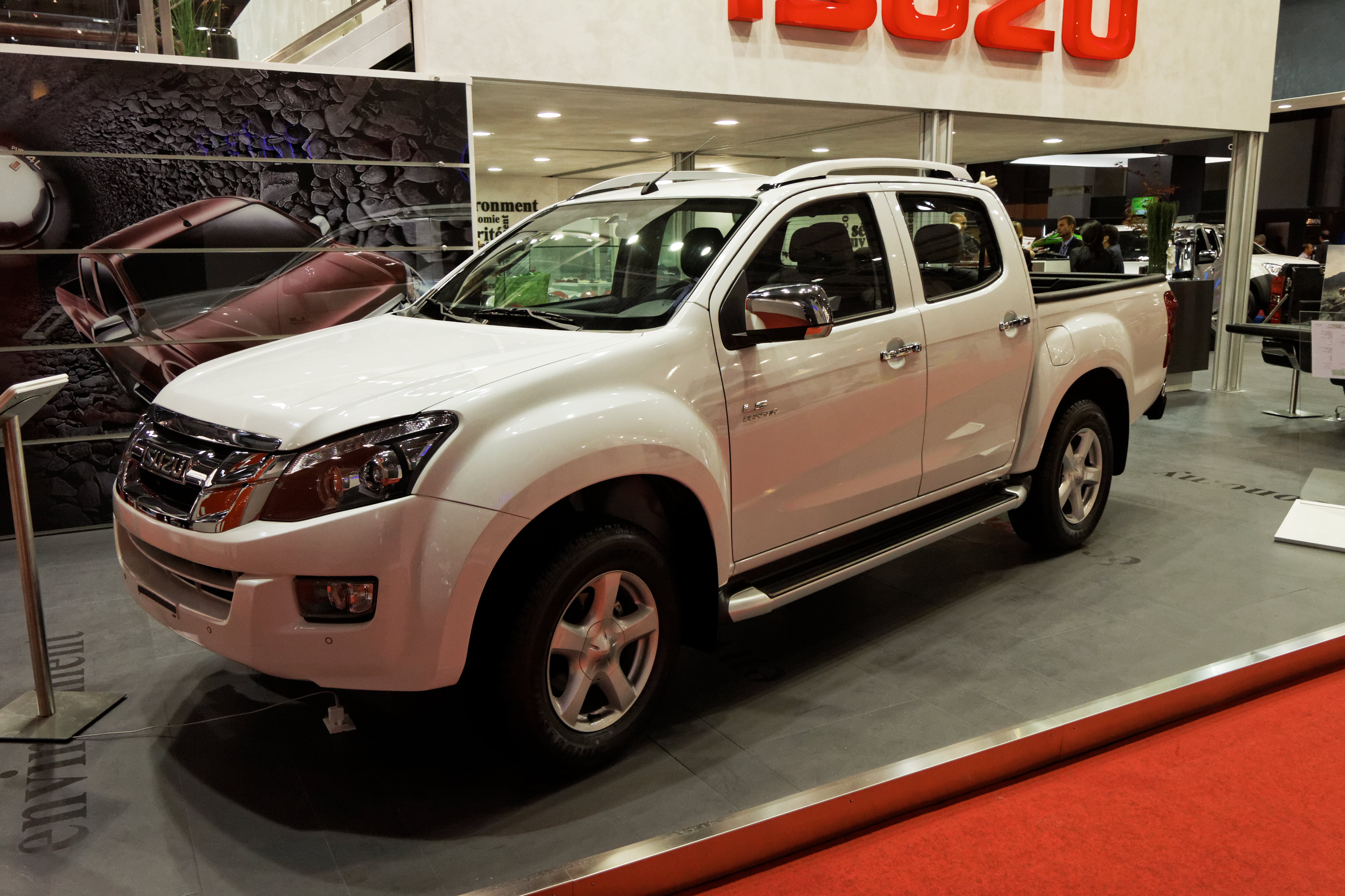 Un D-Max présenté lors du Mondial de l'Automobile de Paris 2012.